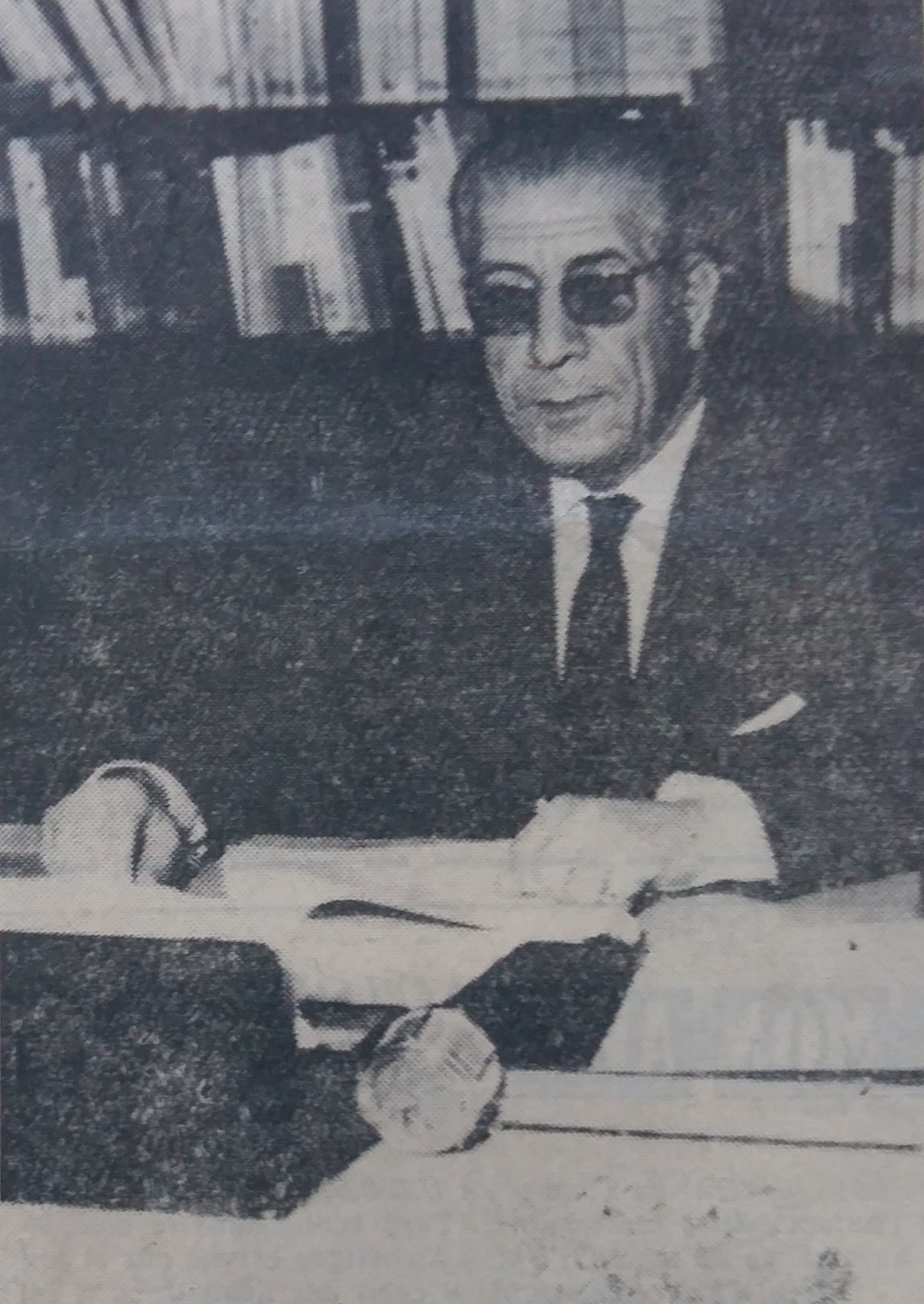 Désignation Hedi Nouira Premier Ministre journal l'action 1970